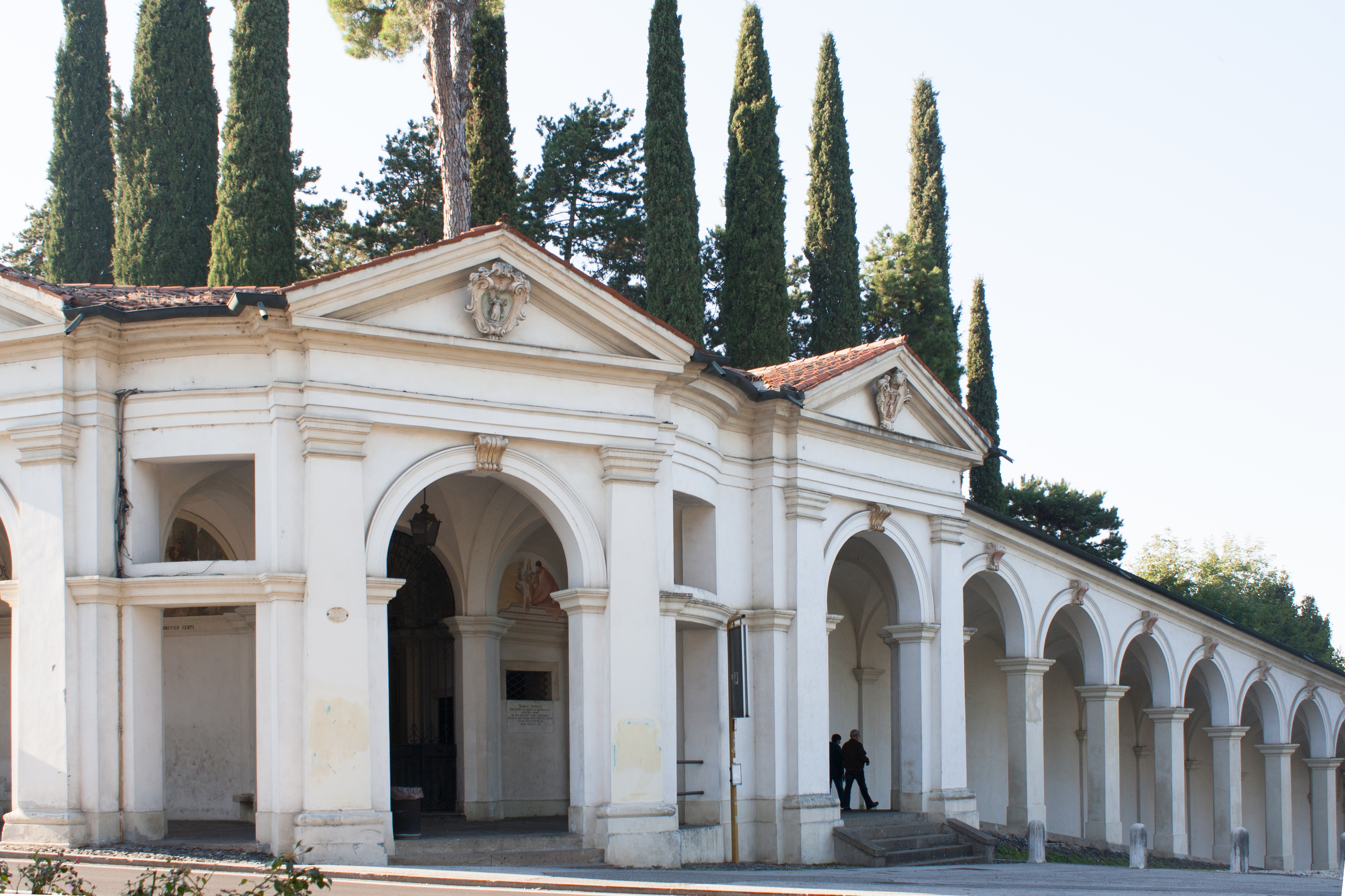 Vicenza - Monte Berico - Portici